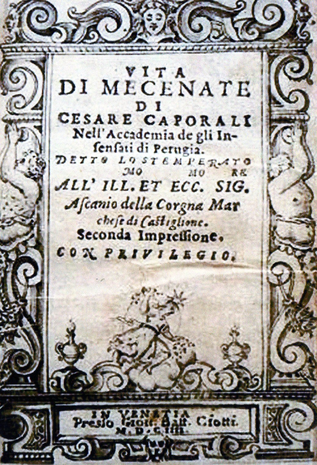 frontespizio della "Vita di Mecenate" (1604), del poeta Cesare Caporali